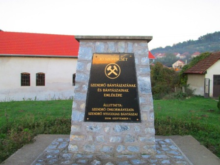 Bányász emlékmű (Szendrő).